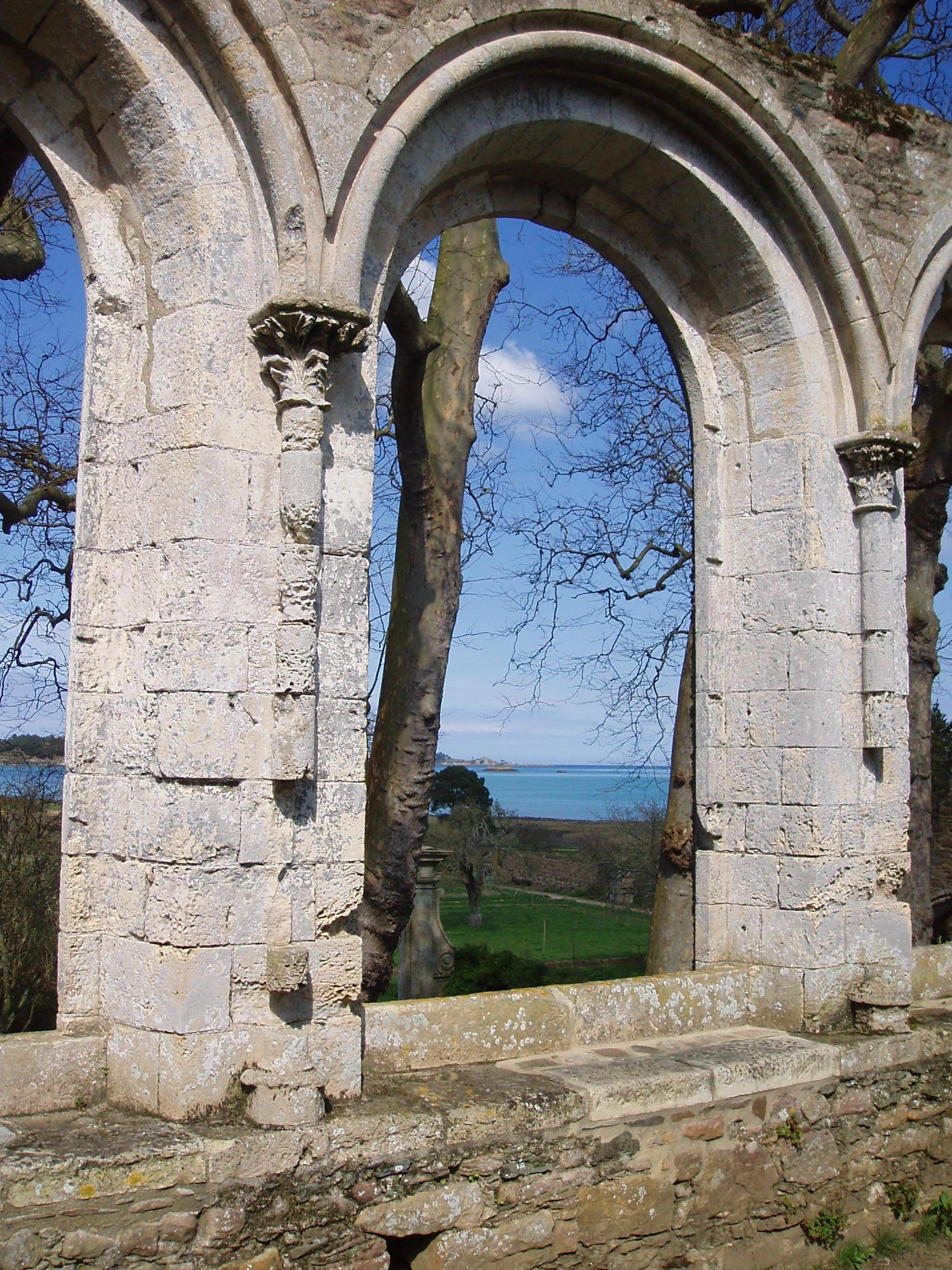 Paimpol-Abbaye de Beauport-vue depuis le refectoire